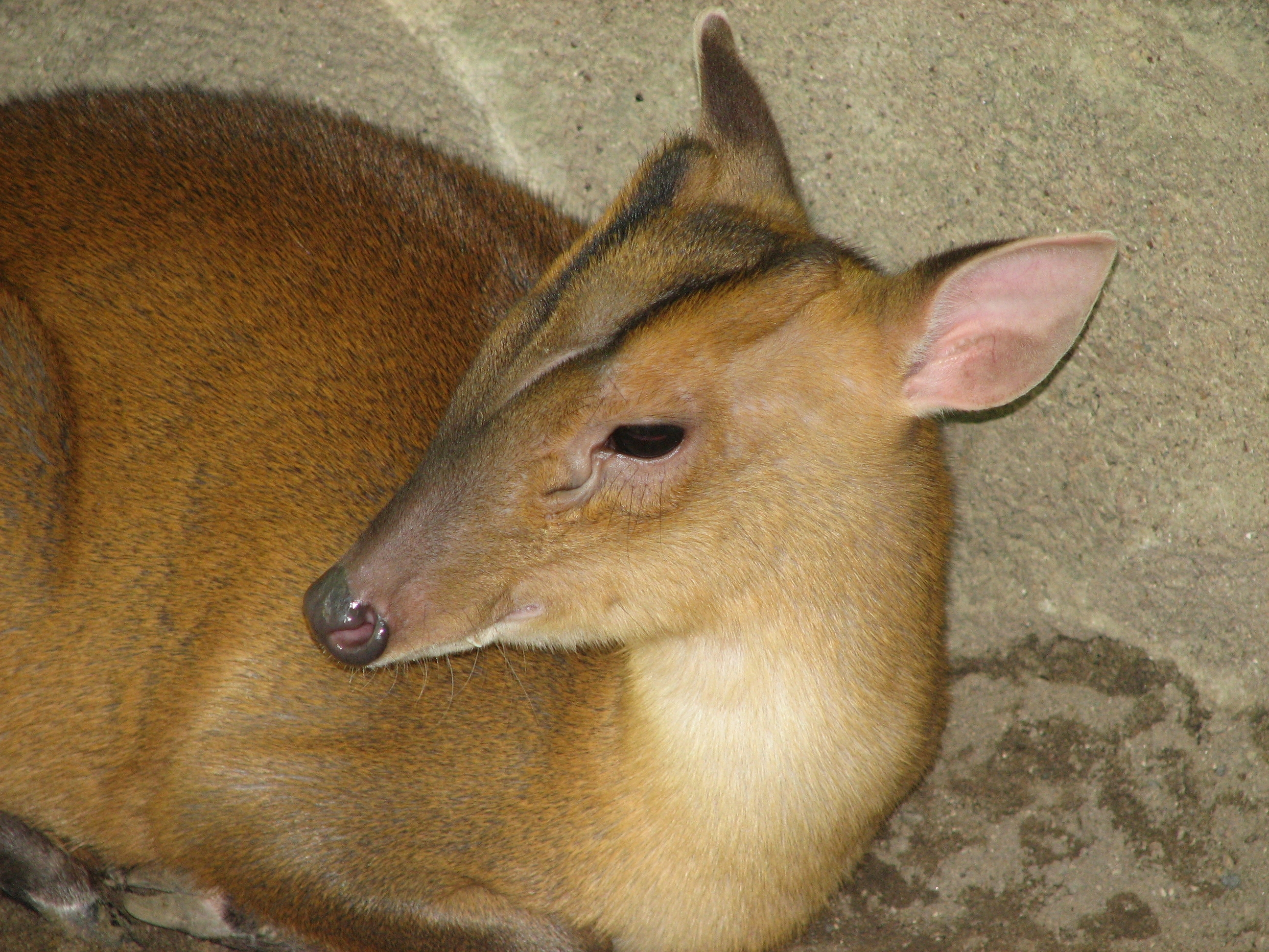 Muntjac